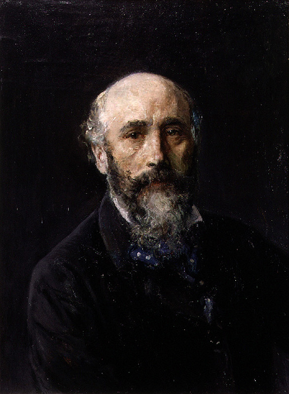 Autorretrato del pintor español Ignacio Pinazo Camarlench (1849-1916).